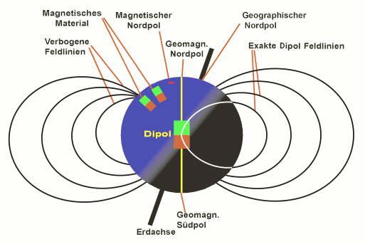 Erdkugel mit Dipol und verbogenen Feldlinien